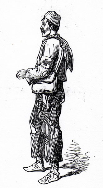 Доброволец красного креста